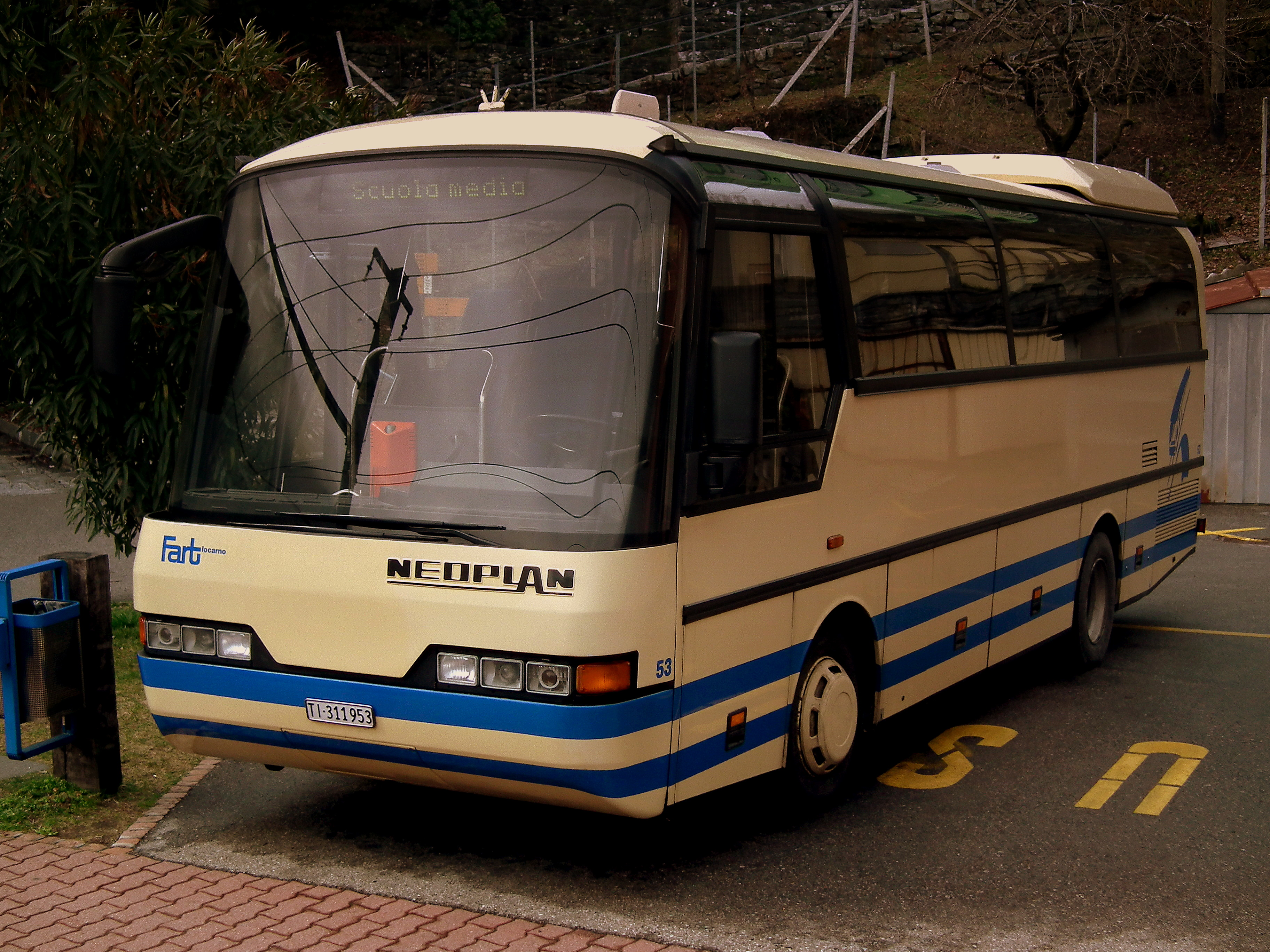 LOCARNO TO DOMOSSOLA INTRAGNA STATION SWITZERLAND MARCH 2011